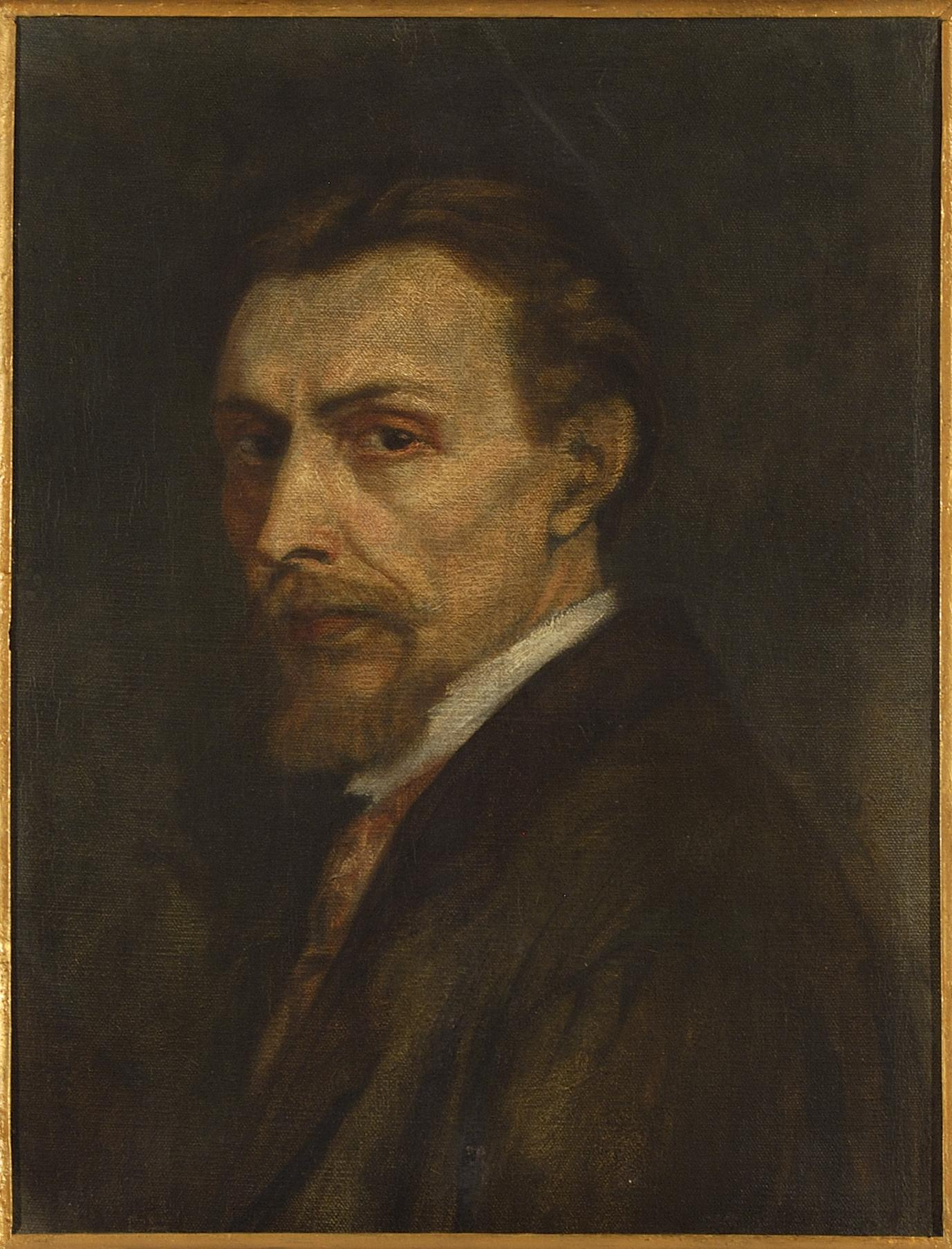 Autoportret